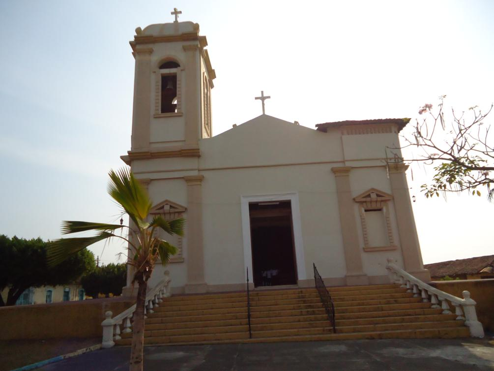 Laborio León, Nicaragua por Richard Weiss